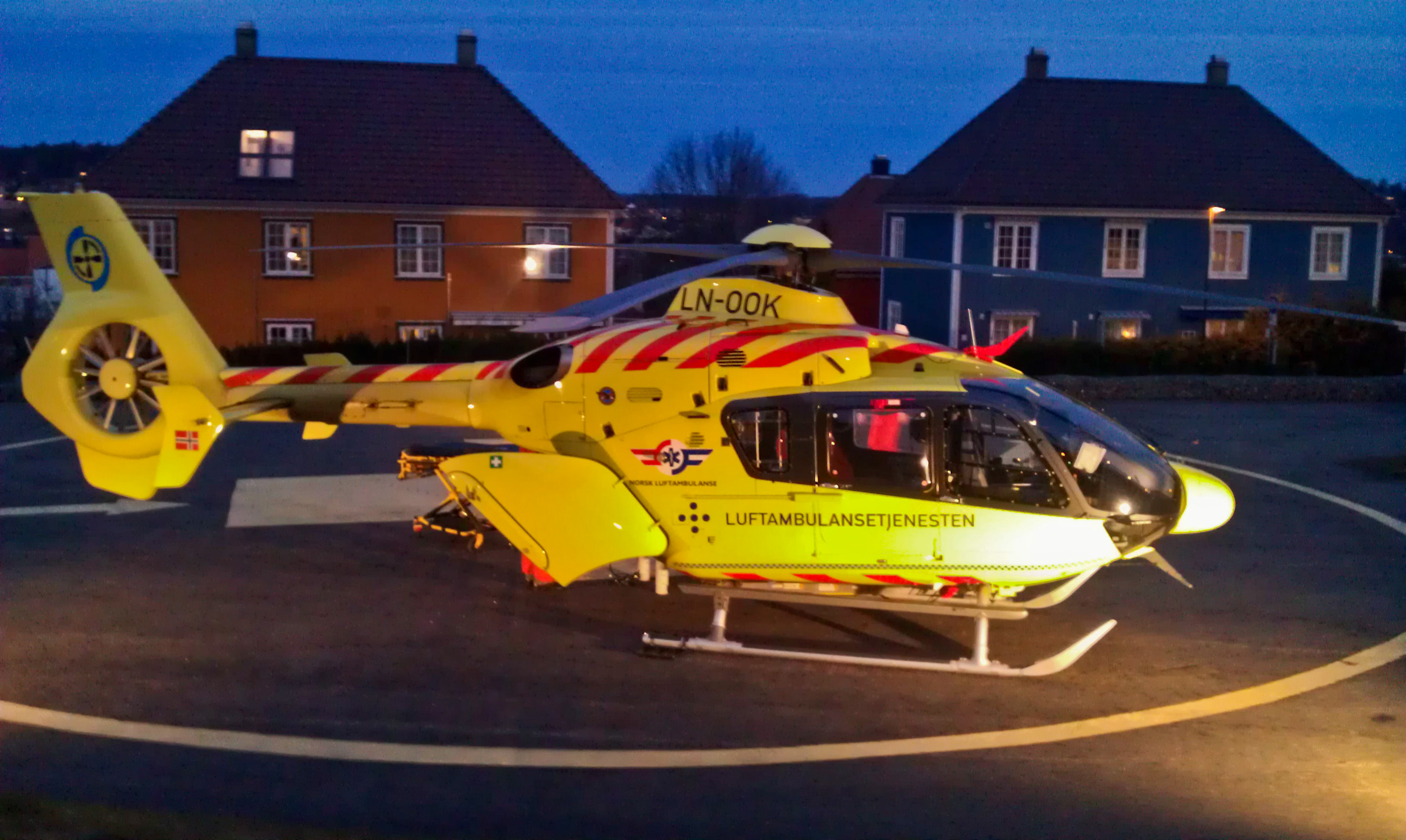 Norsk Luftambulanse, ambulansehelikopter ved Sykehuset i Vestfold, Tønsberg.